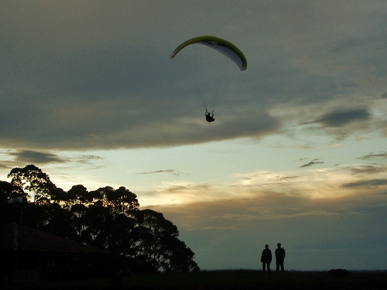 parapente (paraglider)